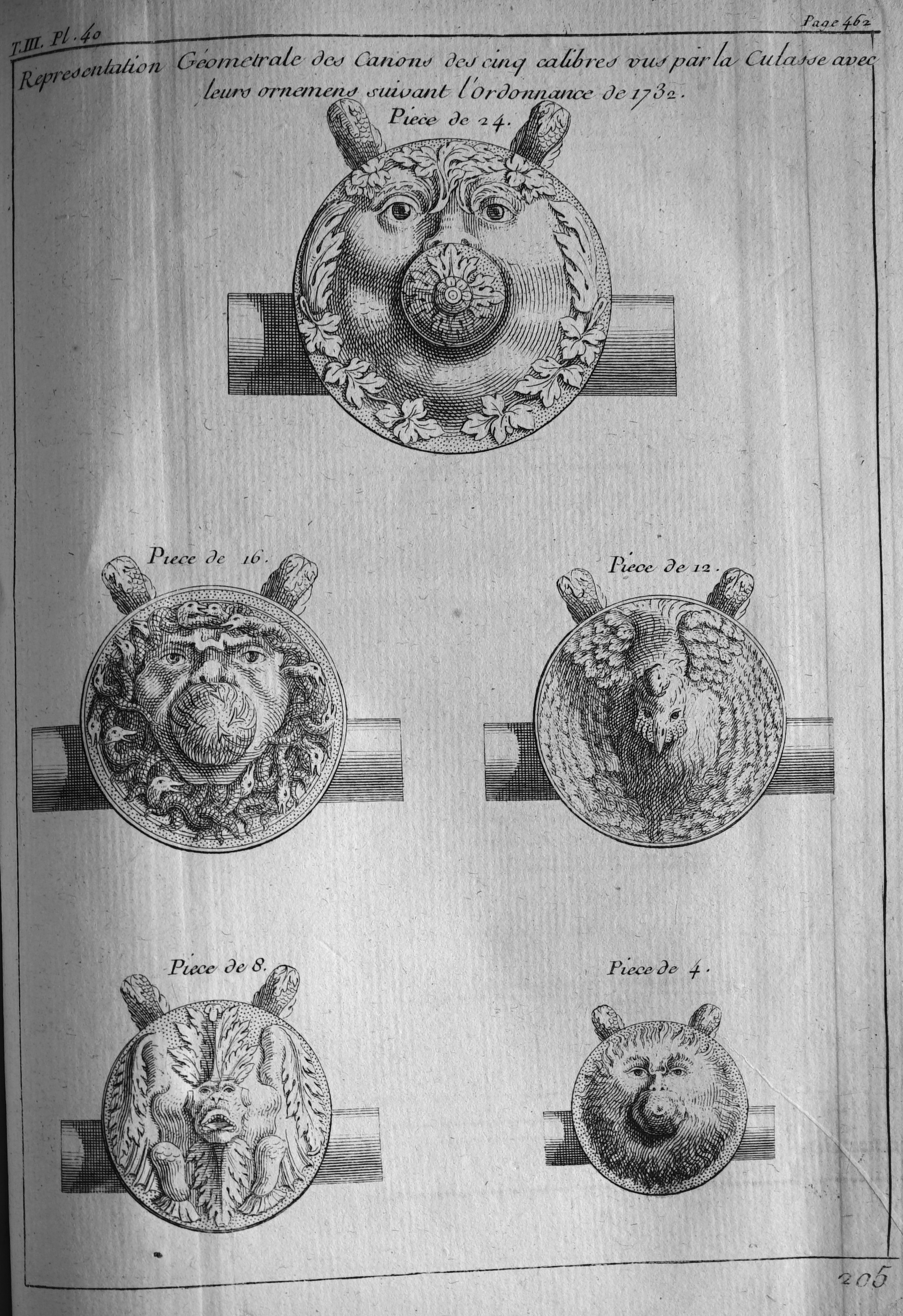 Mémoires d'artillerie, recueillis par M. Surirey de Saint Remy, tome III, exemplaire de la B.M. de Nancy, troisième édition.